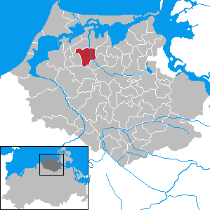 Divitz-Spoldershagen in Mecklenburg-Vorpommern - District Nordvorpommern